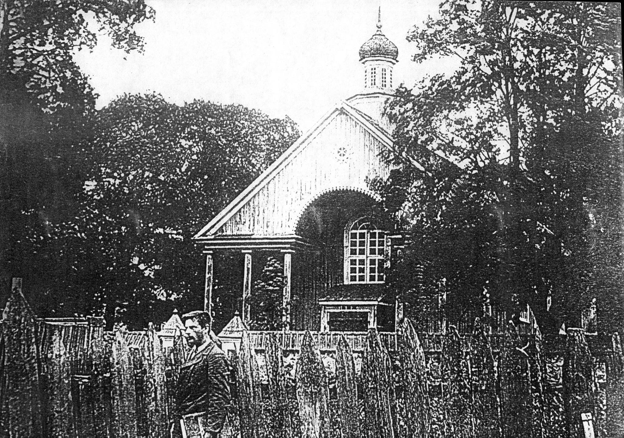 Беларуская (тарашкевіца): Докшыцы (Dokšycy), пляц Рынак (plac Rynak). Касьцёл